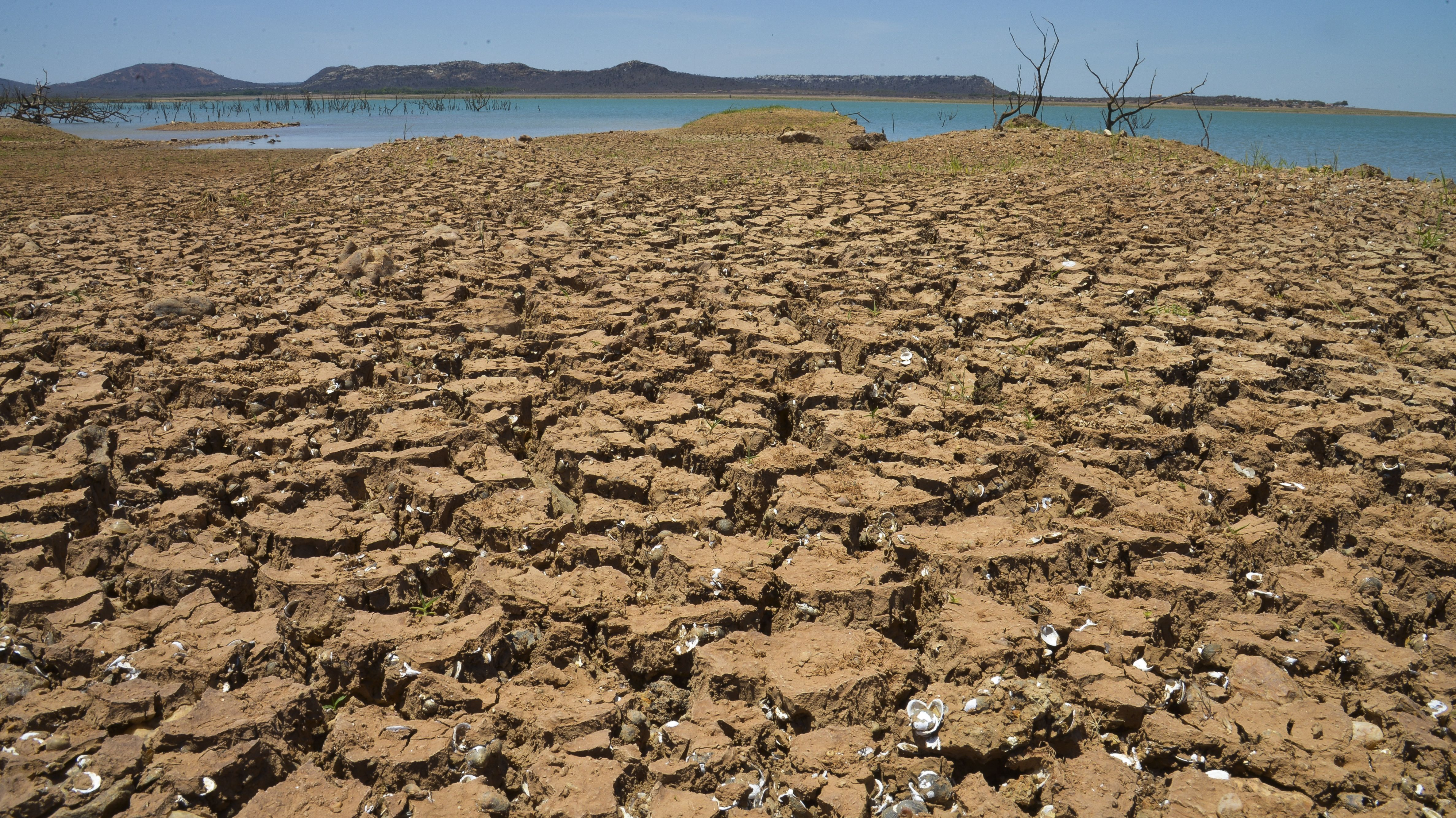 Remanso (BA) - Com a falta de chuva na nascente do Rio São Francisco, o reservatório de Sobradinho vive a maior seca de sua história.